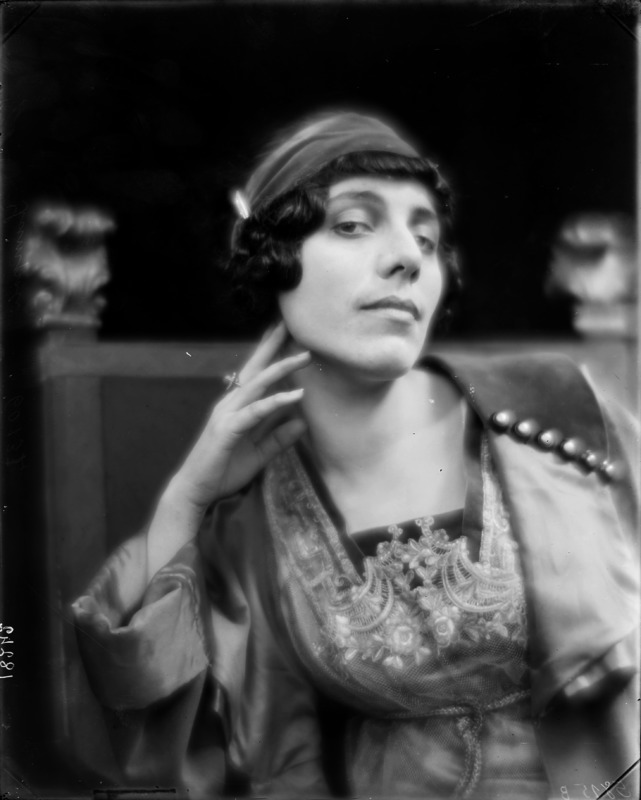 Amalia Guglielminetti fotografata da Mario Nunes Vais